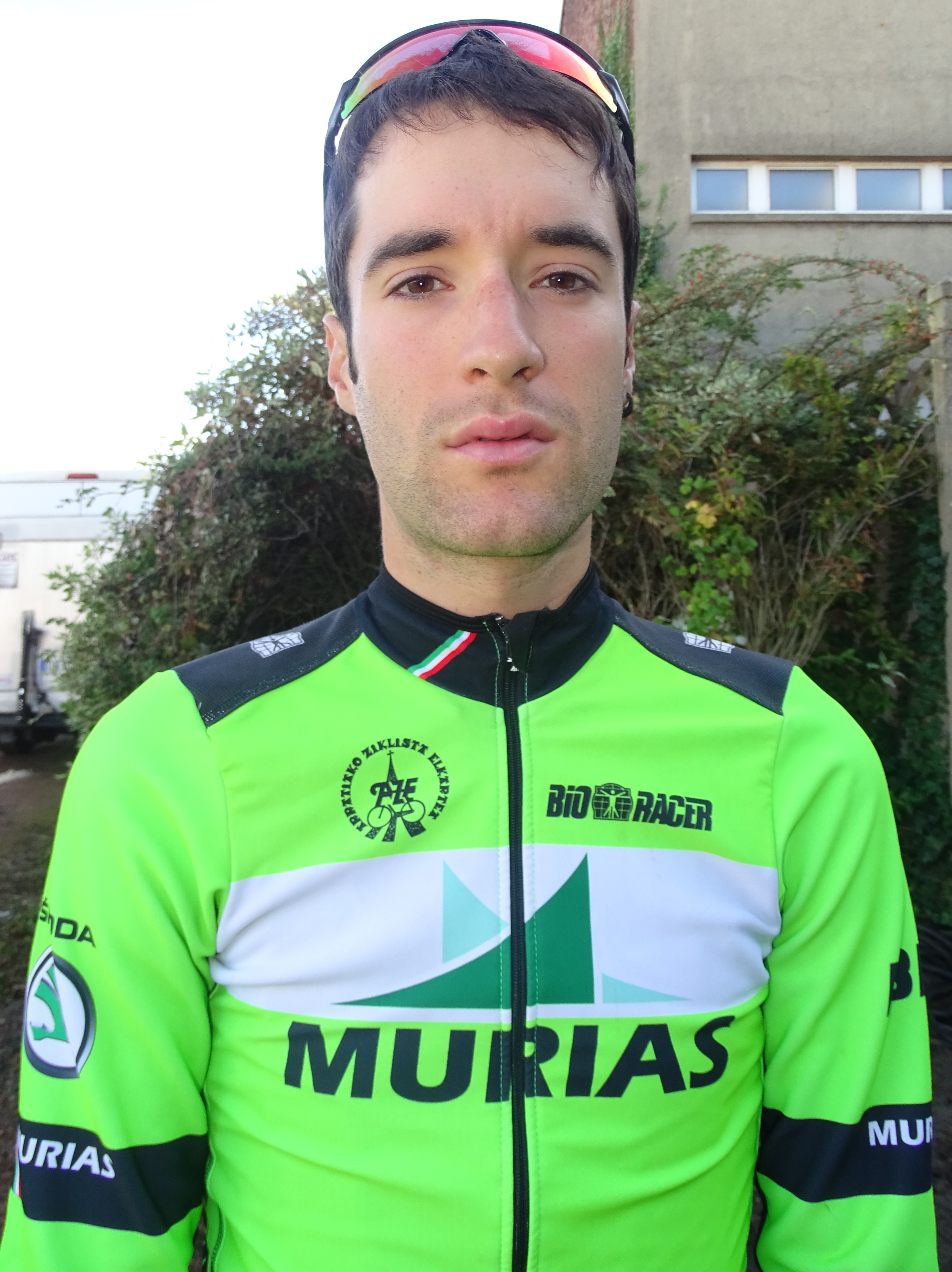 Reportage réalisé le dimanche 20 septembre à l'occasion du départ et de l'arrivée du Grand Prix d'Isbergues 2015 à Isbergues, Nord-Pas-de-Calais, France.